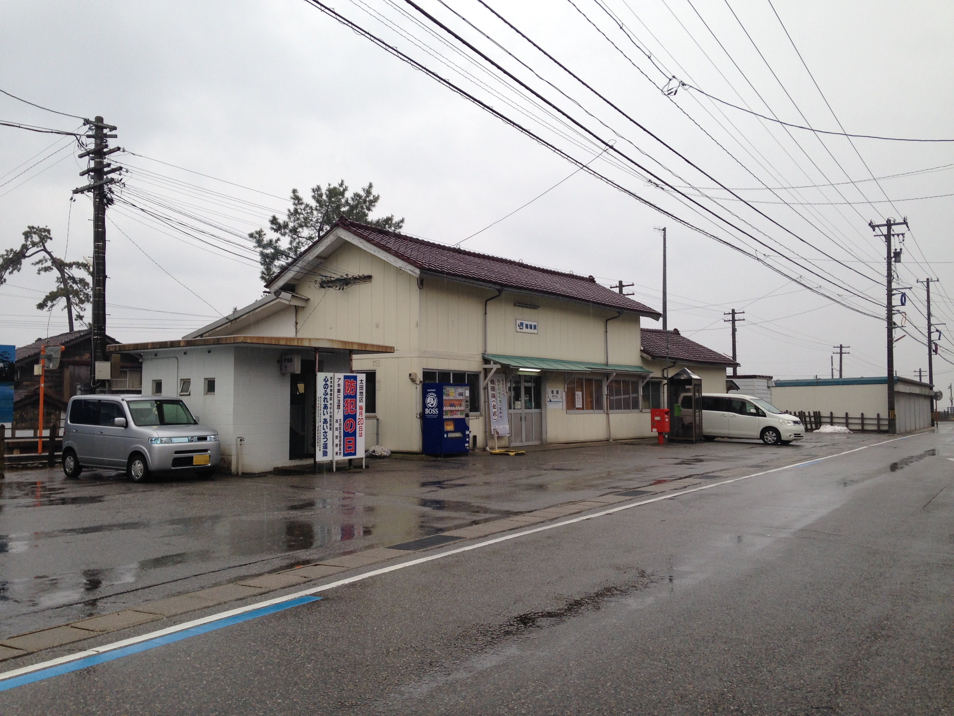 雨晴駅駅舎の遠景